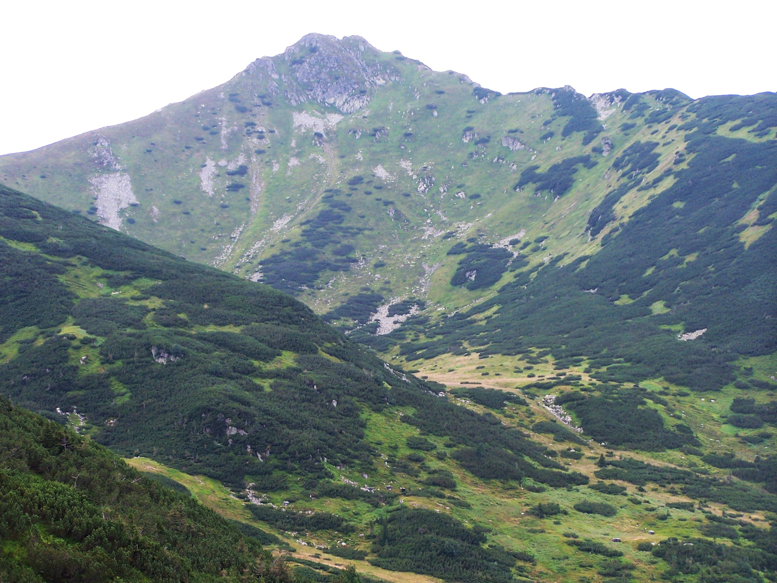 Dolina Goryczkowa (West Tatra Mountains)